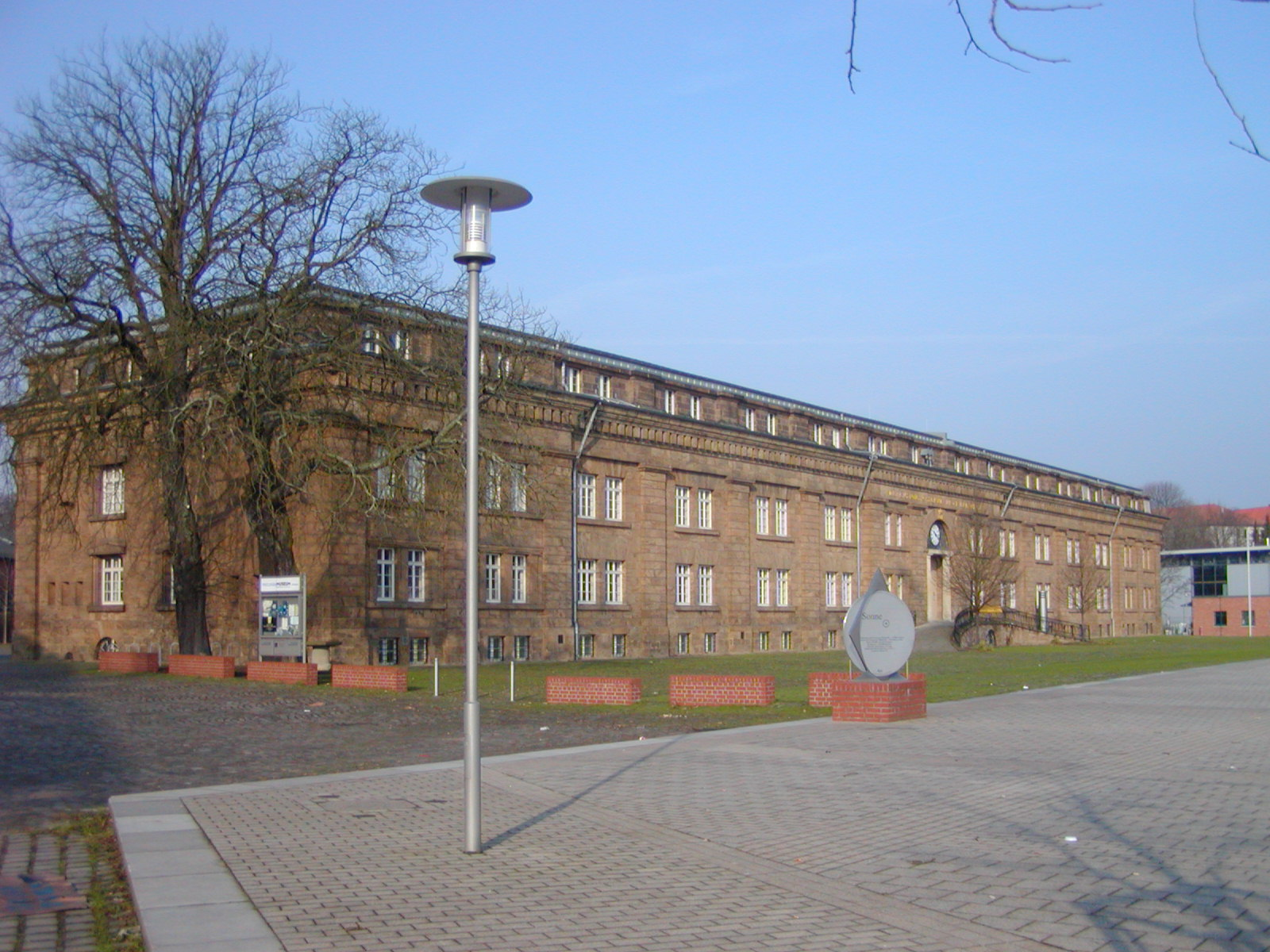 Das Hauptgebäude des Preußenmuseums in Minden, Nordrhein-Westfalen. Das heute als Museum genutzte Gebäude am Simeonsplatz war einst die Defensionskaserne und war Teil der Festung Minden. Die Skulptur in der Bildmitte stellt die Sonne dar und markiert den Beginn des astronomiekundlichen Wanderwegs Planetenweg.